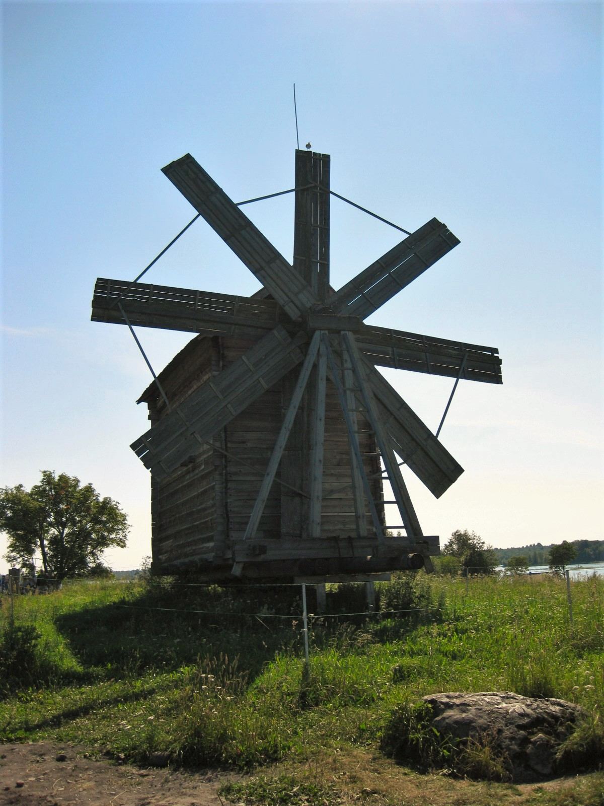 Ветряная мельница из д. Толвуя: остров Кижи, Медвежьегорский район, Карелия